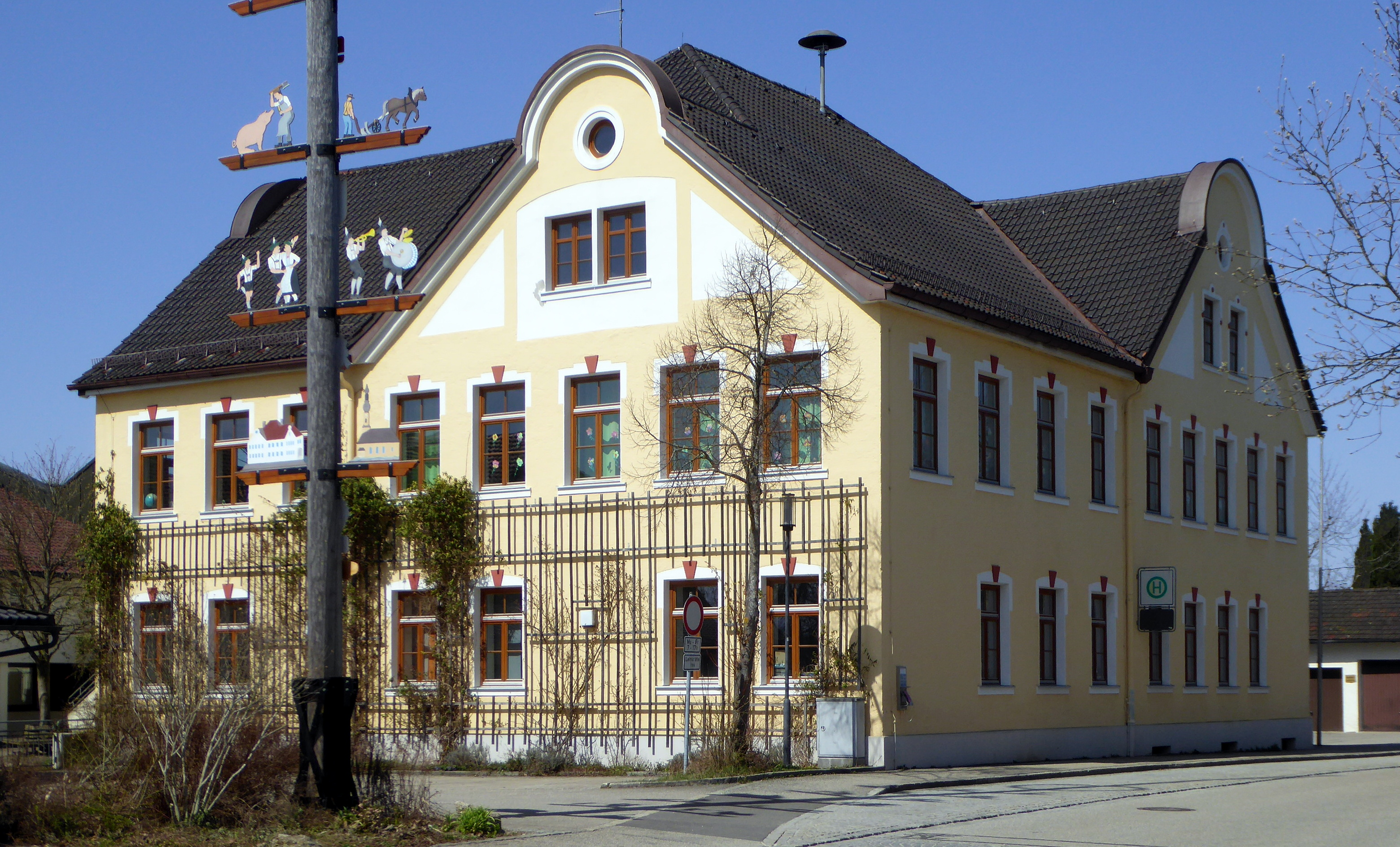 Traunwalchen (Traunreut), Carl-Orff-Schule von Ostsüdosten gesehen.